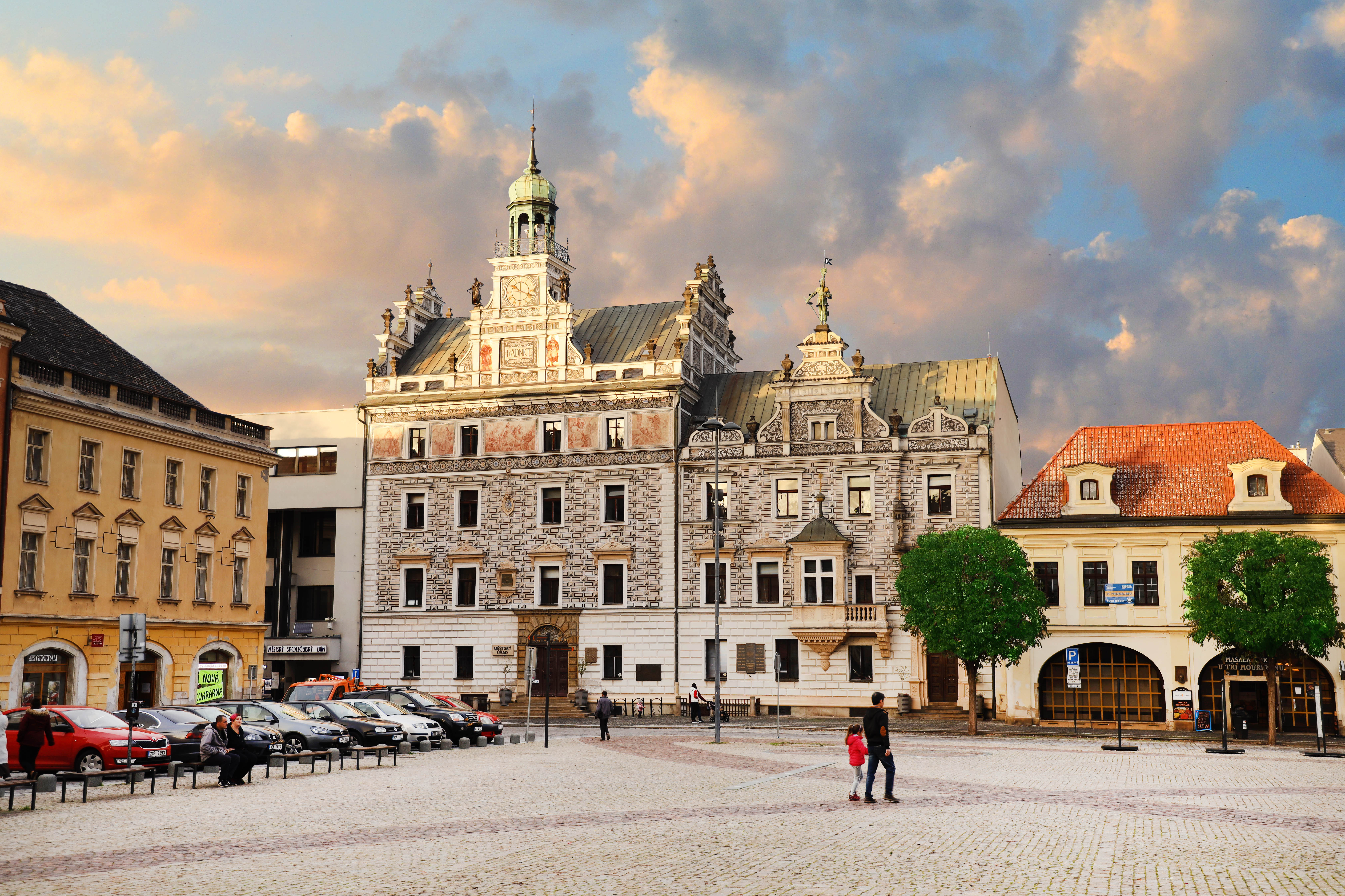 Pohled na kolínskou radnici a část náměstí z jižní strany